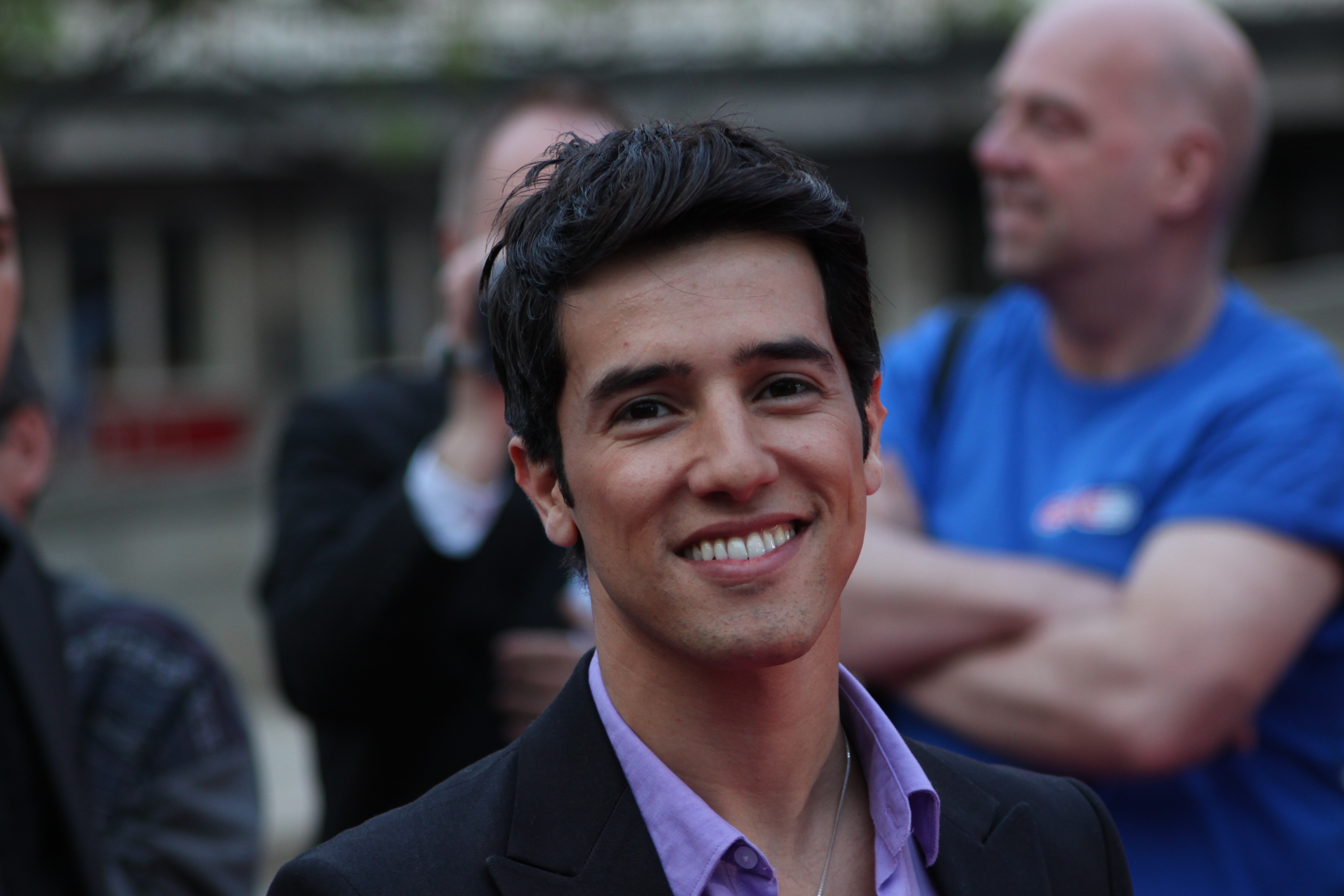 Foto: Vincent Hasselgård, Aktiv I Oslo.no